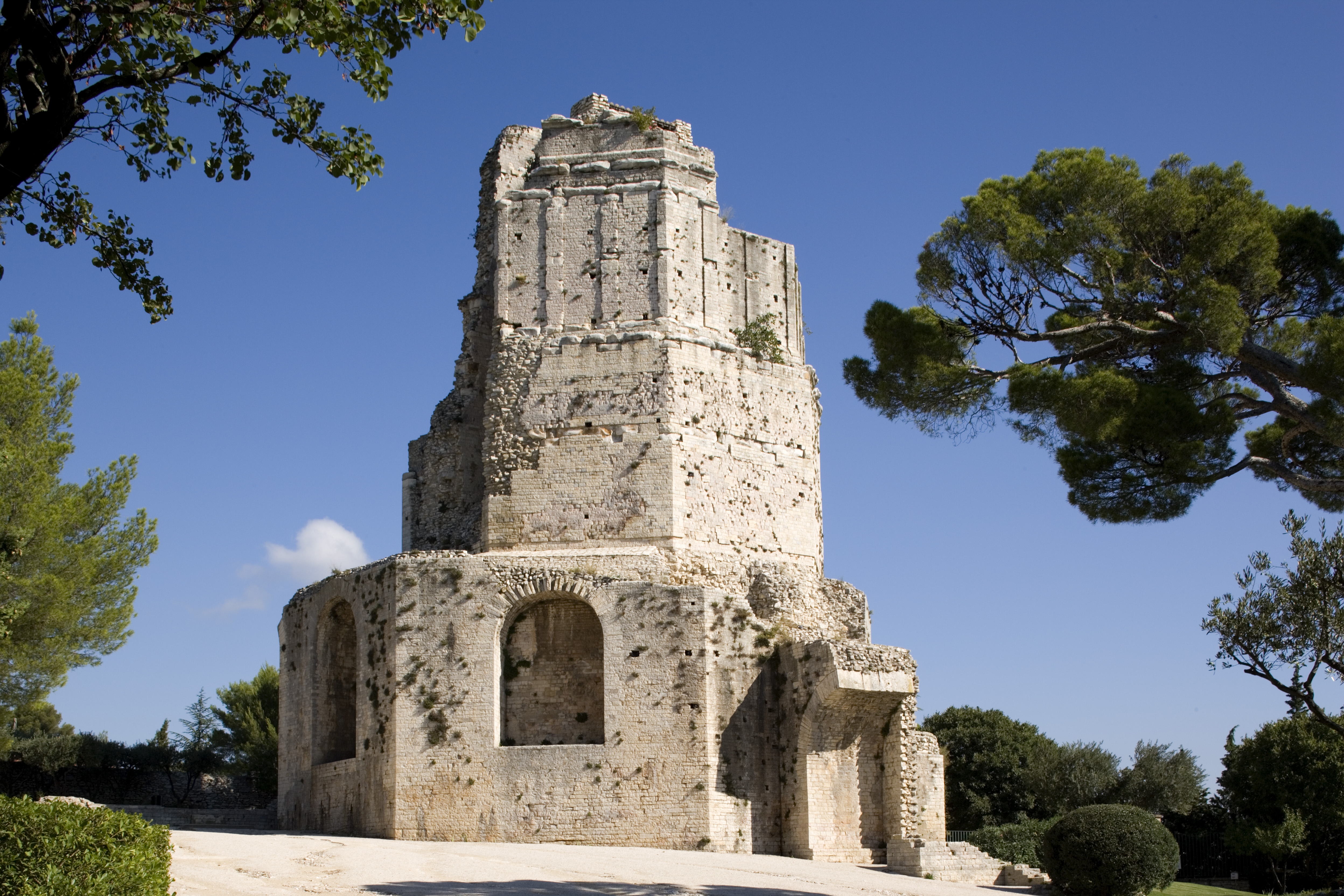 La tour Magne, à Nîmes (Gard, Languedoc-Roussillon, France).